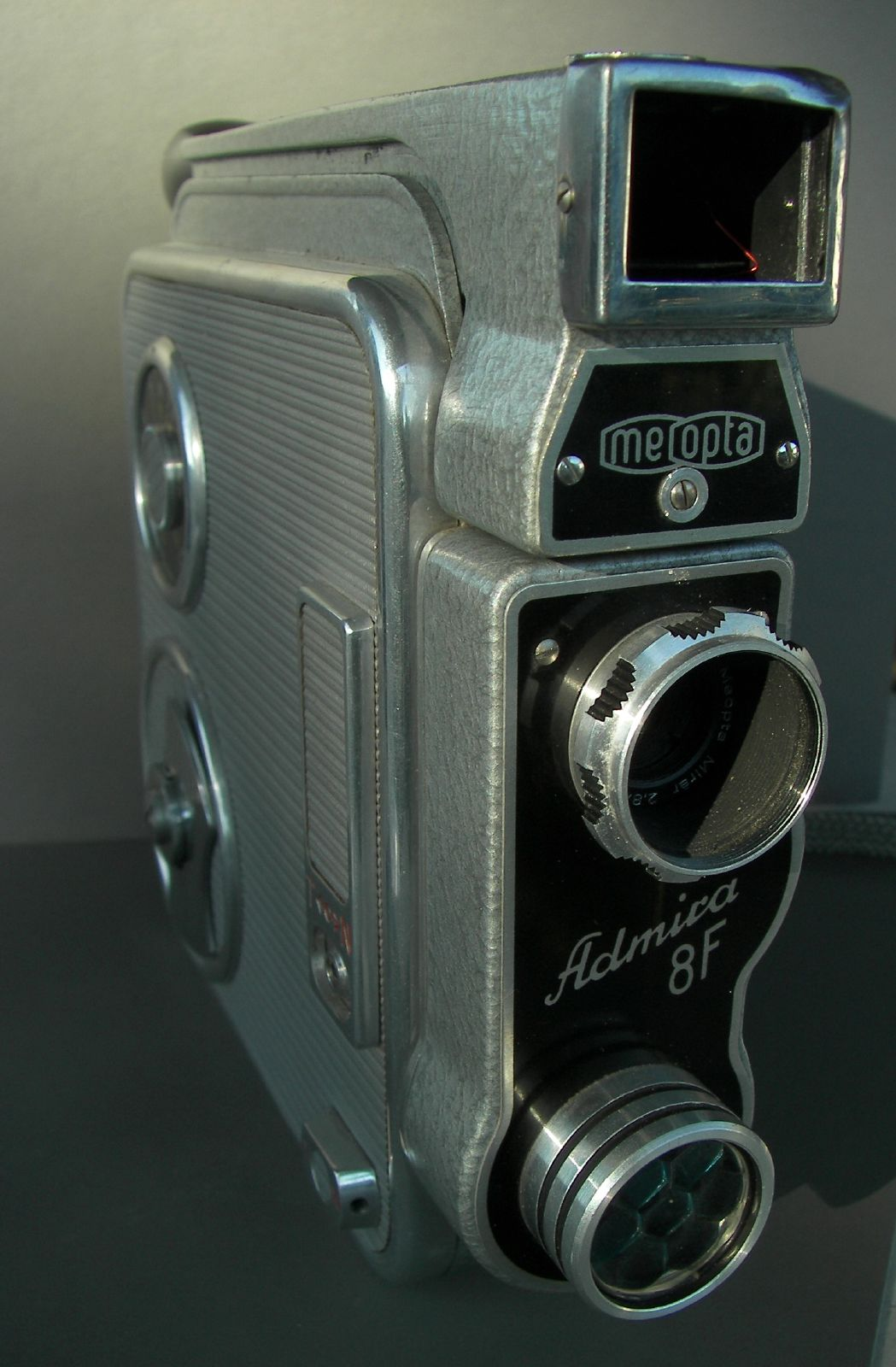 Made in Czechoslovakia by Meopta,circa 1964